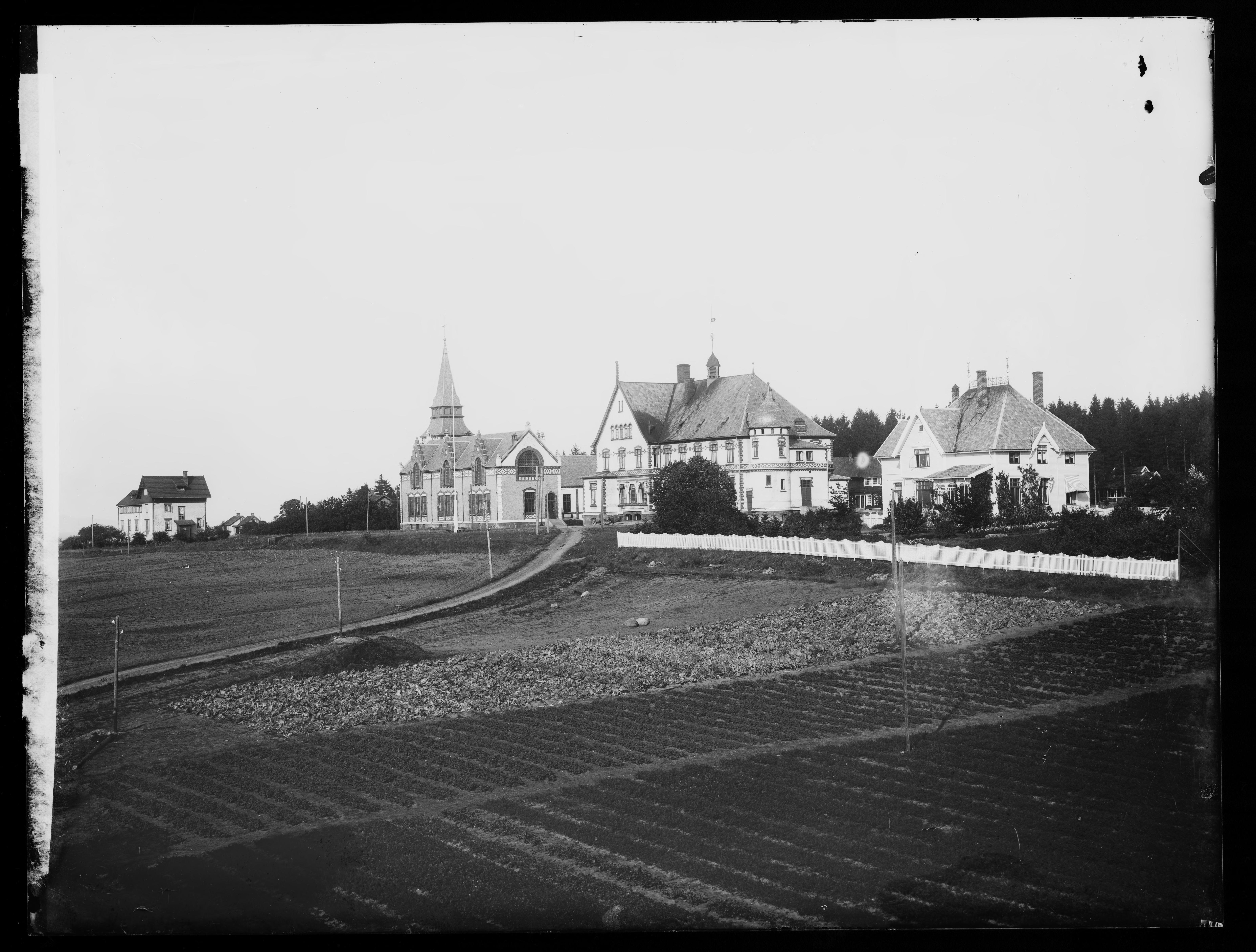 Bildet er hentet fra Nasjonalbibliotekets bildesamling. Anmerkninger til bildet var: Påskrift arkivark: Bastø skolehjem Eldste arkivnummer: 966 Yngre arkivnummer: 168 Bastøy, Horten, Vestfold